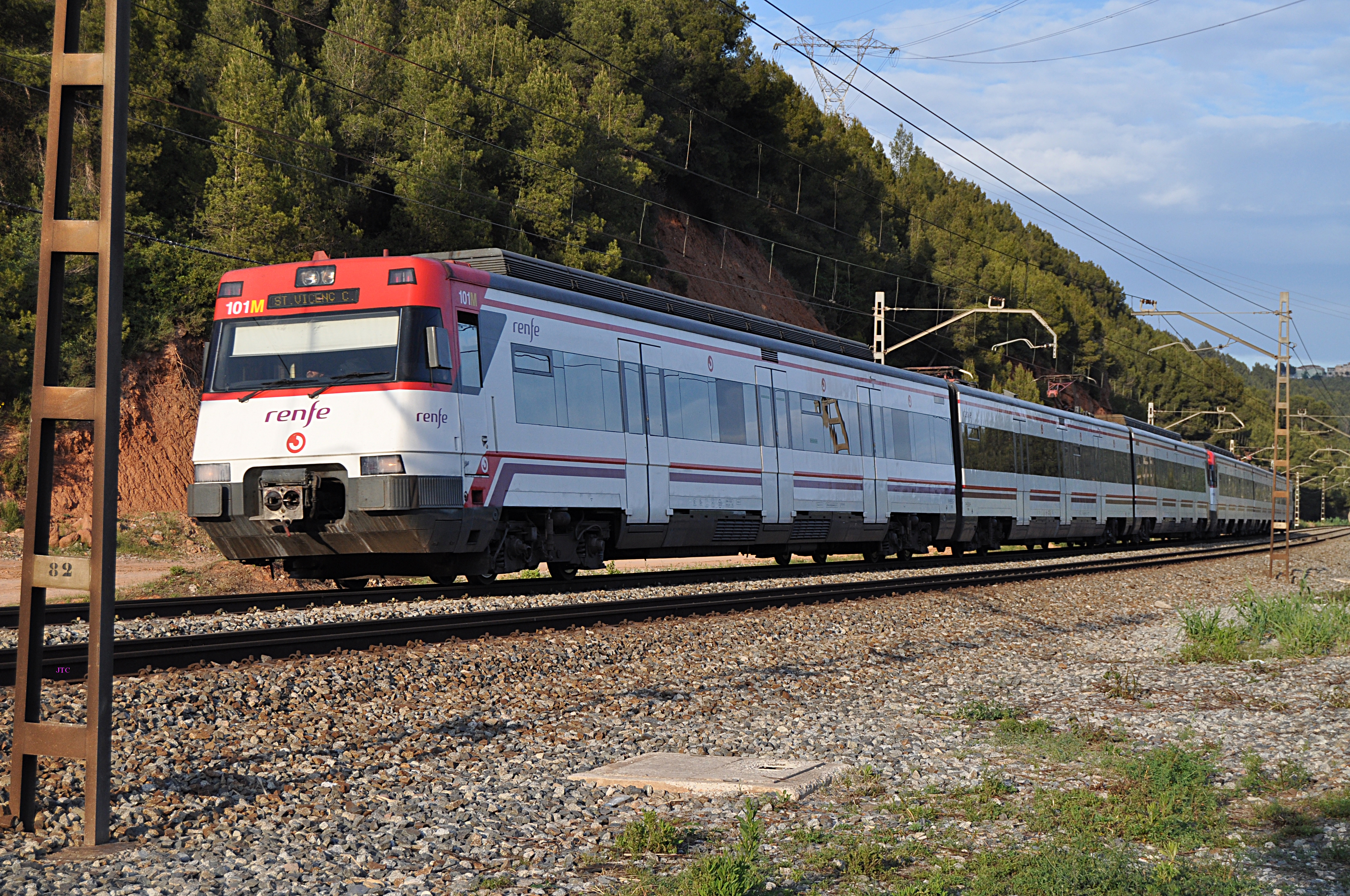 Una doble unidad 447 de Renfe Operadora que realiza un servicio de Rodalies de Catalunya, circulando por la doble curva de Castellbisbal.